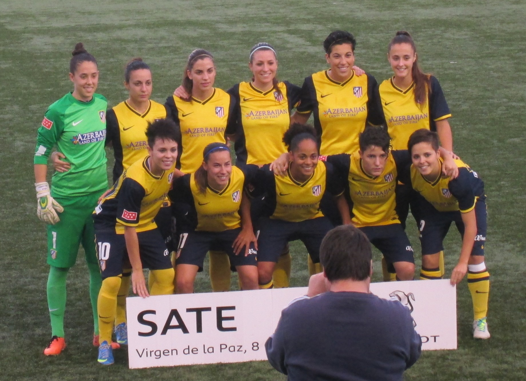 Atletico de Madrid Feminas